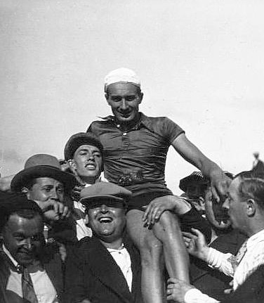 Championnat de France de cyclisme 1931 à Montlhéry : Armand Blanchonnet porté en tromphe